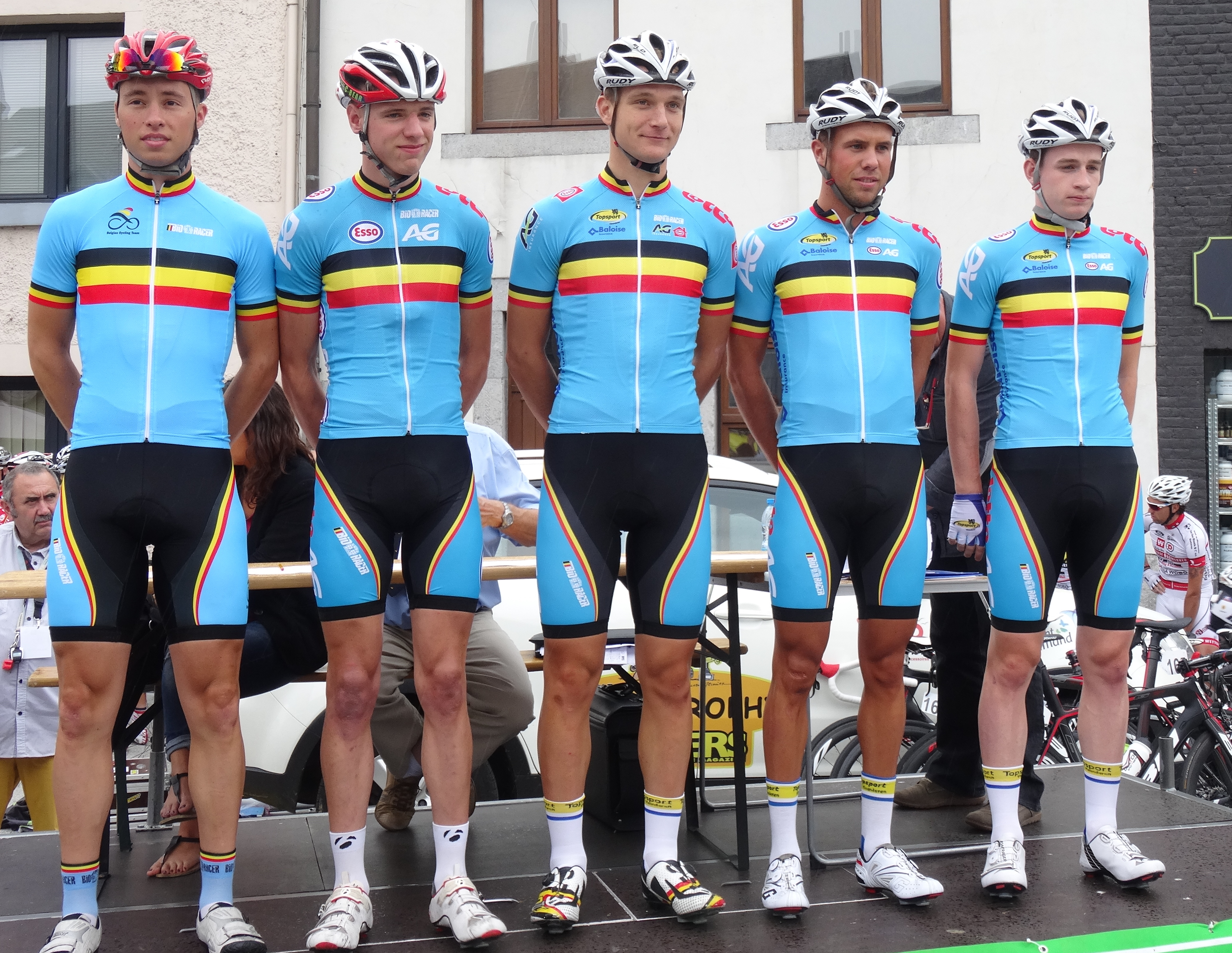 Reportage photographique réalisé le mercredi 6 août à l'occasion du départ de la première étape du Tour de la province de Namur 2014 à Jambes (Namur), Belgique.